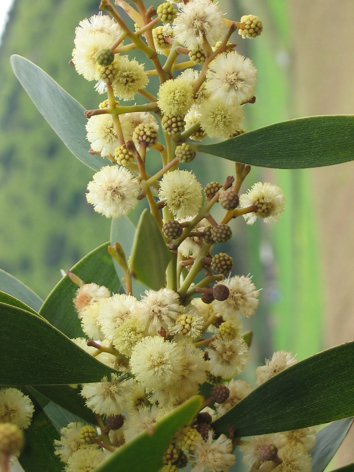 Schwarzholzakazie (Acacia melanoxylon) - Flowers